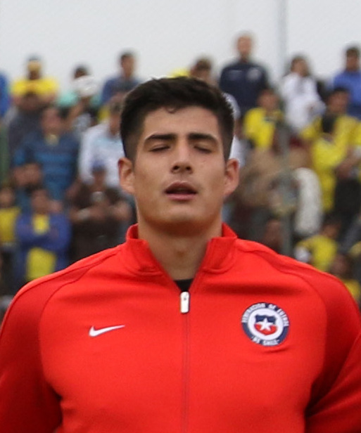 Ambato, Ecuador, 22 enero 2017 (Andes).- Ecuador igualó 1-1 este domingo con Chile en la ciudad de Ambato y dejó vivas las posibilidades de clasificar a la fase final del Campeonato Sudamericano Sub 20 del que es anfitrión, y se alista desde ya para jugar con Paraguay en la última jornada, el jueves próximo, en la ciudad ecuatoriana de Ríobamba. ANDES/Micaela Ayala V.